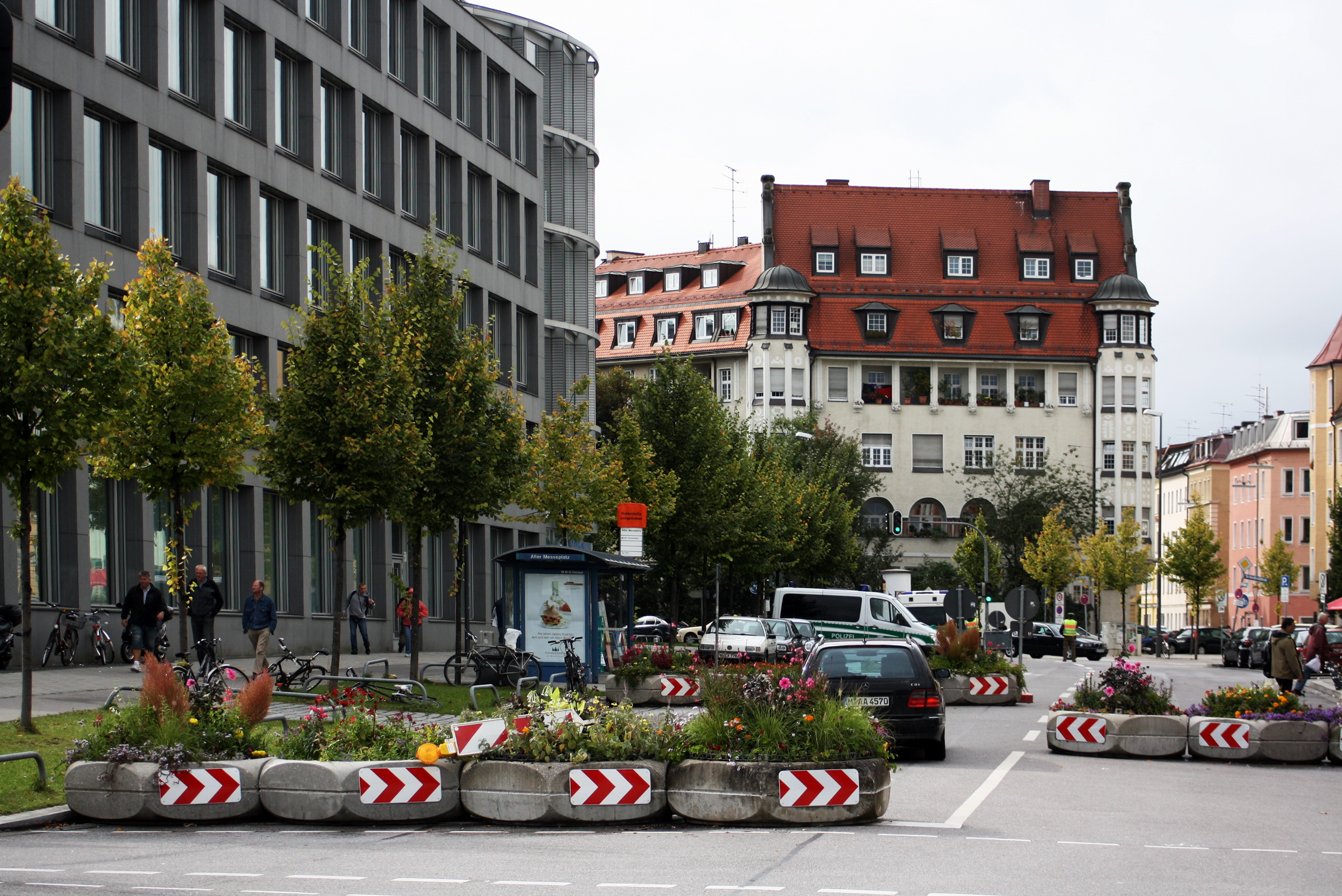 Sperrring am Oktoberfest München 2010. Alter Messeplatz - Betonpflanzenkübel werden zur Verkehrslenkung benutzt. Sie sollen den Durchbruch eines mit Sprengstoff etc. beladen Lkw abhalten.